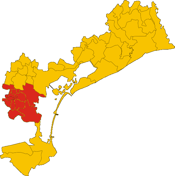 Mappa dei comuni appartenenti alla Riviera del Brenta, Venezia, Veneto, Italia